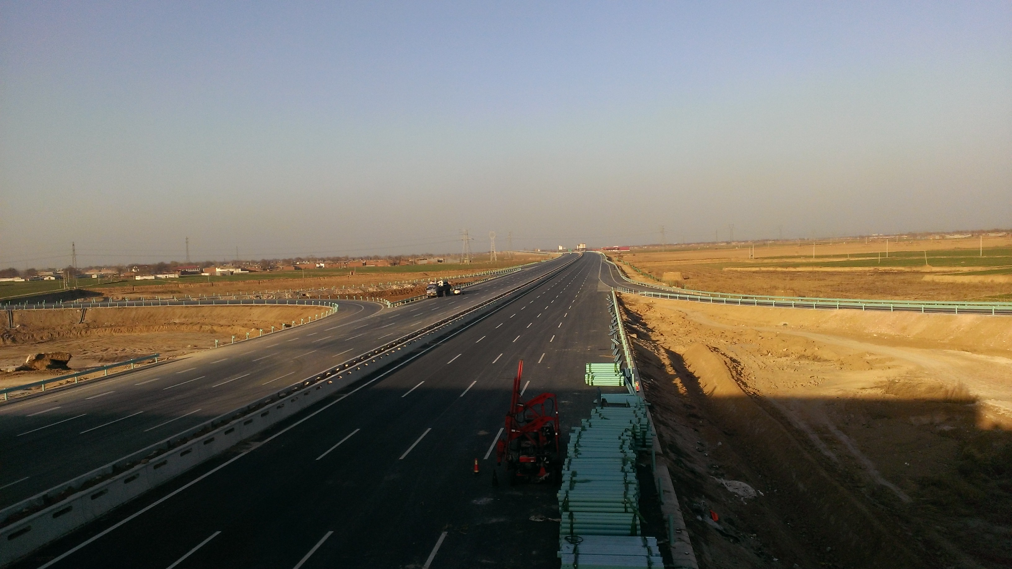 中文（中国大陆）: 正在改扩建的京港澳高速